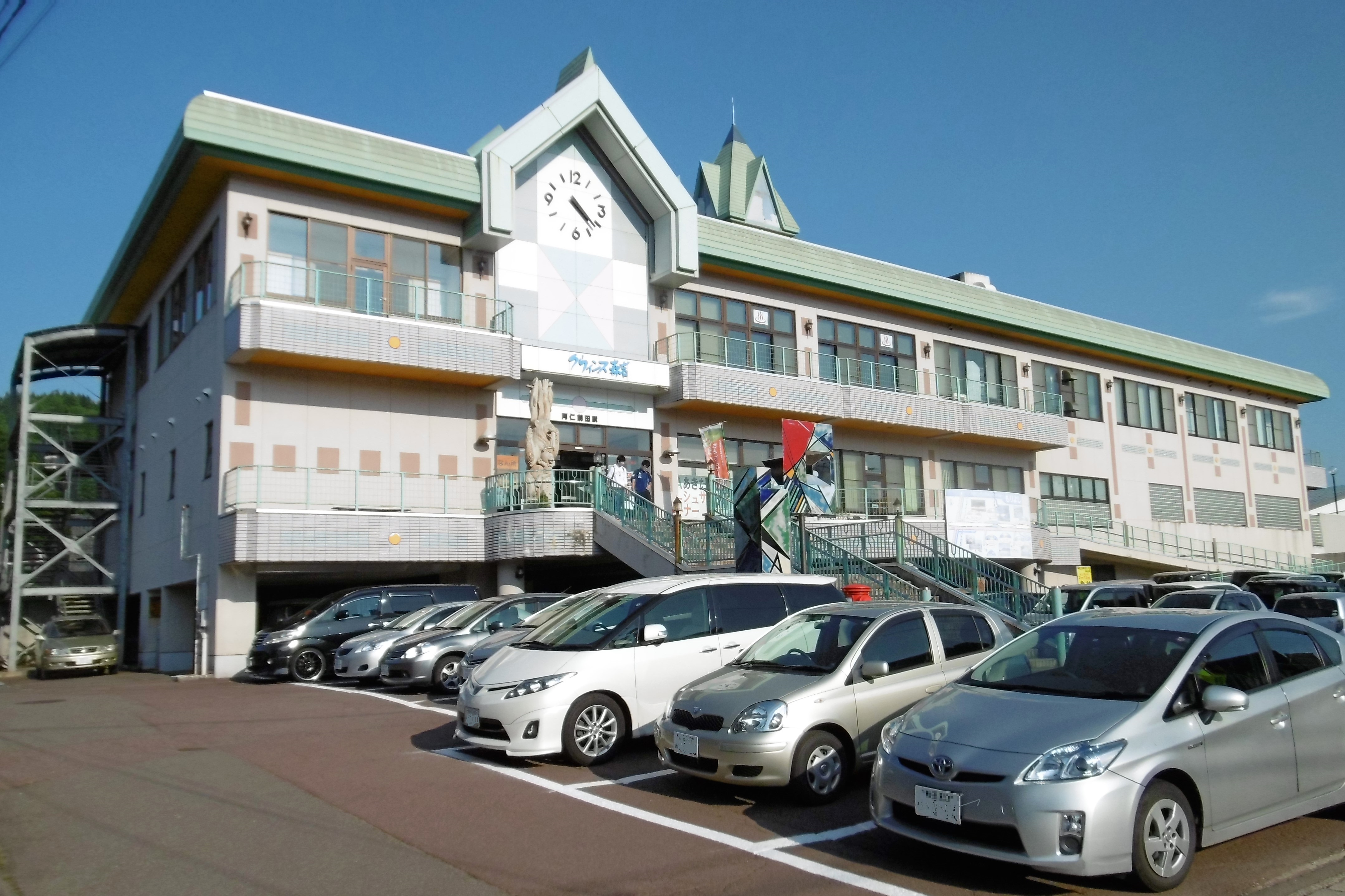 秋田内陸線 阿仁前田駅：秋田県北秋田市小又